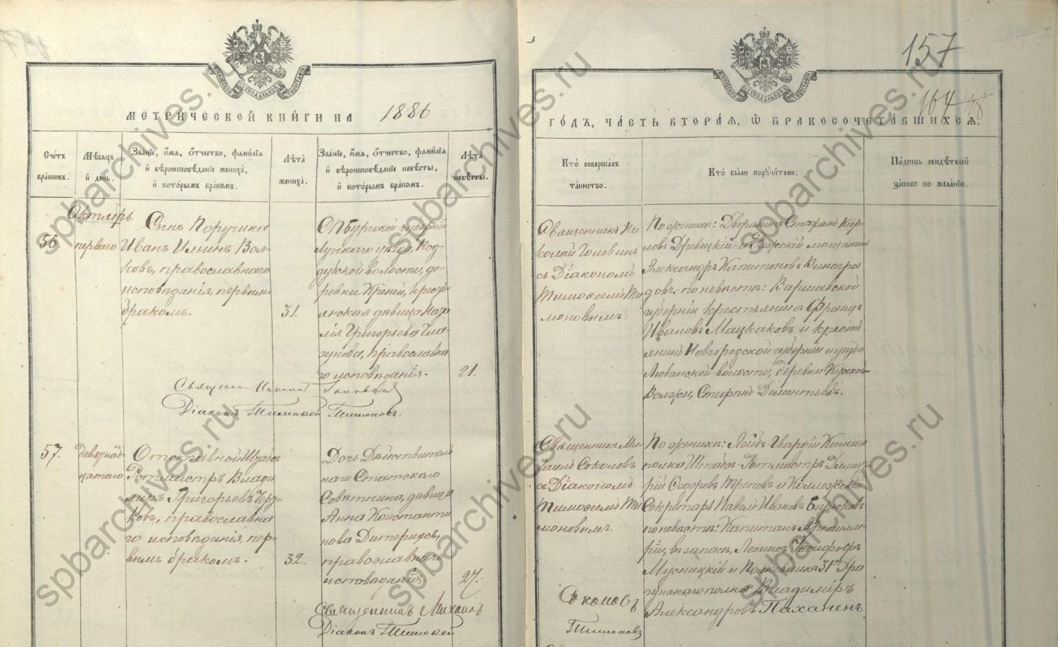 Метрическая запись о браке В. Г. Черткова с А. К. Дитерихс.